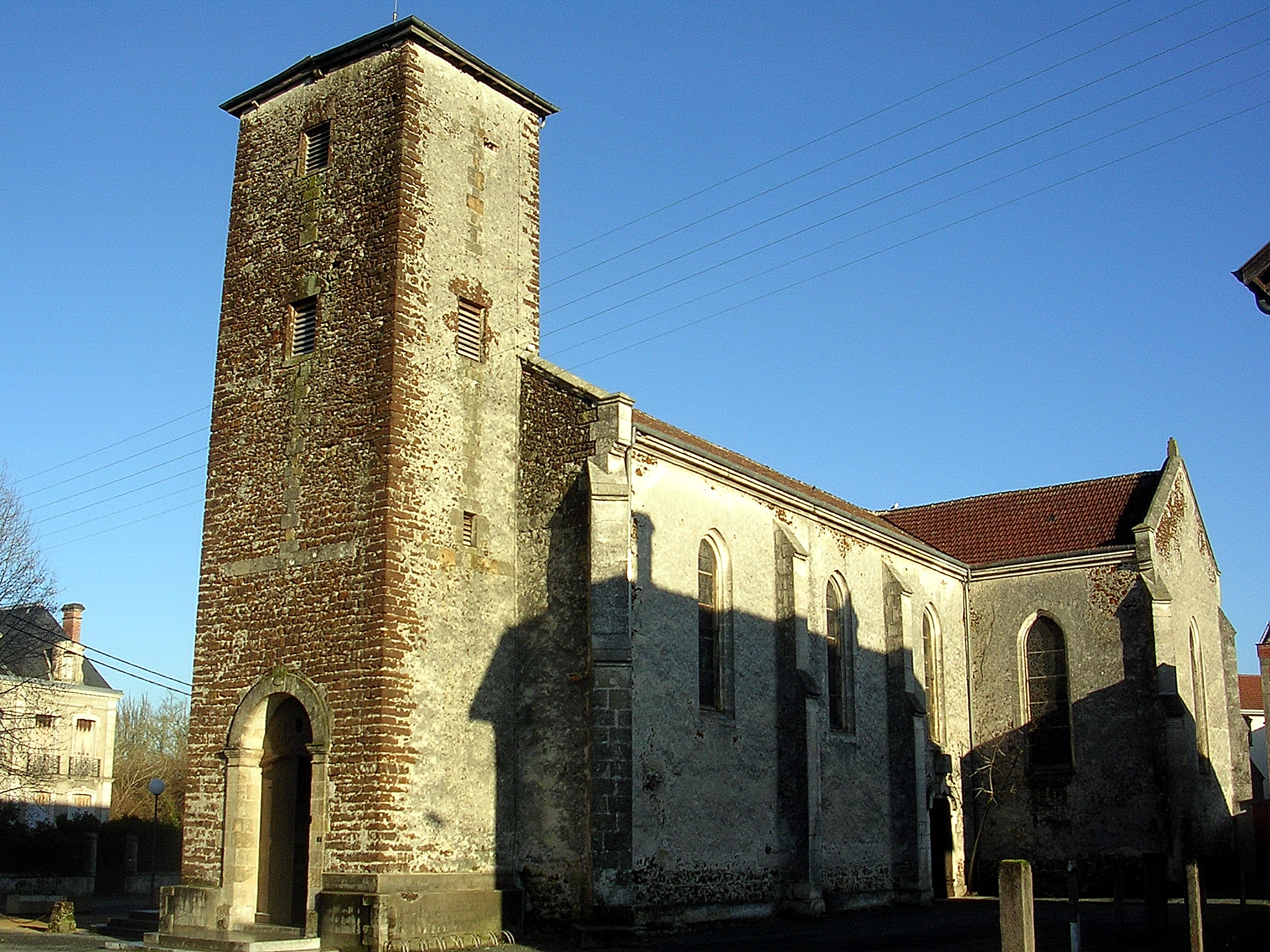 Église de Labouheyre, dans le département français des Landes